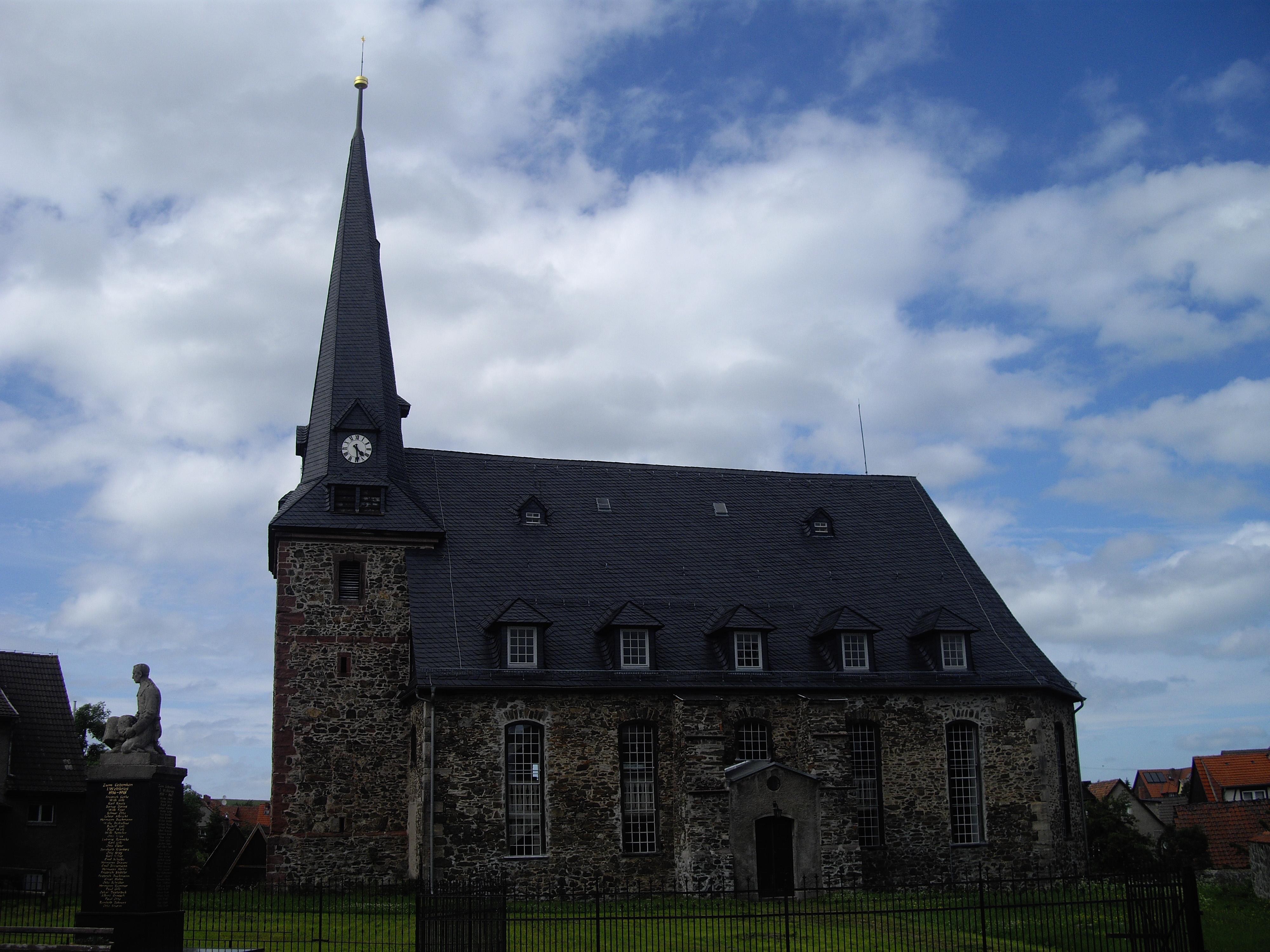 Die Dorfkirche von Königerode, Gemeinde Harzgerode